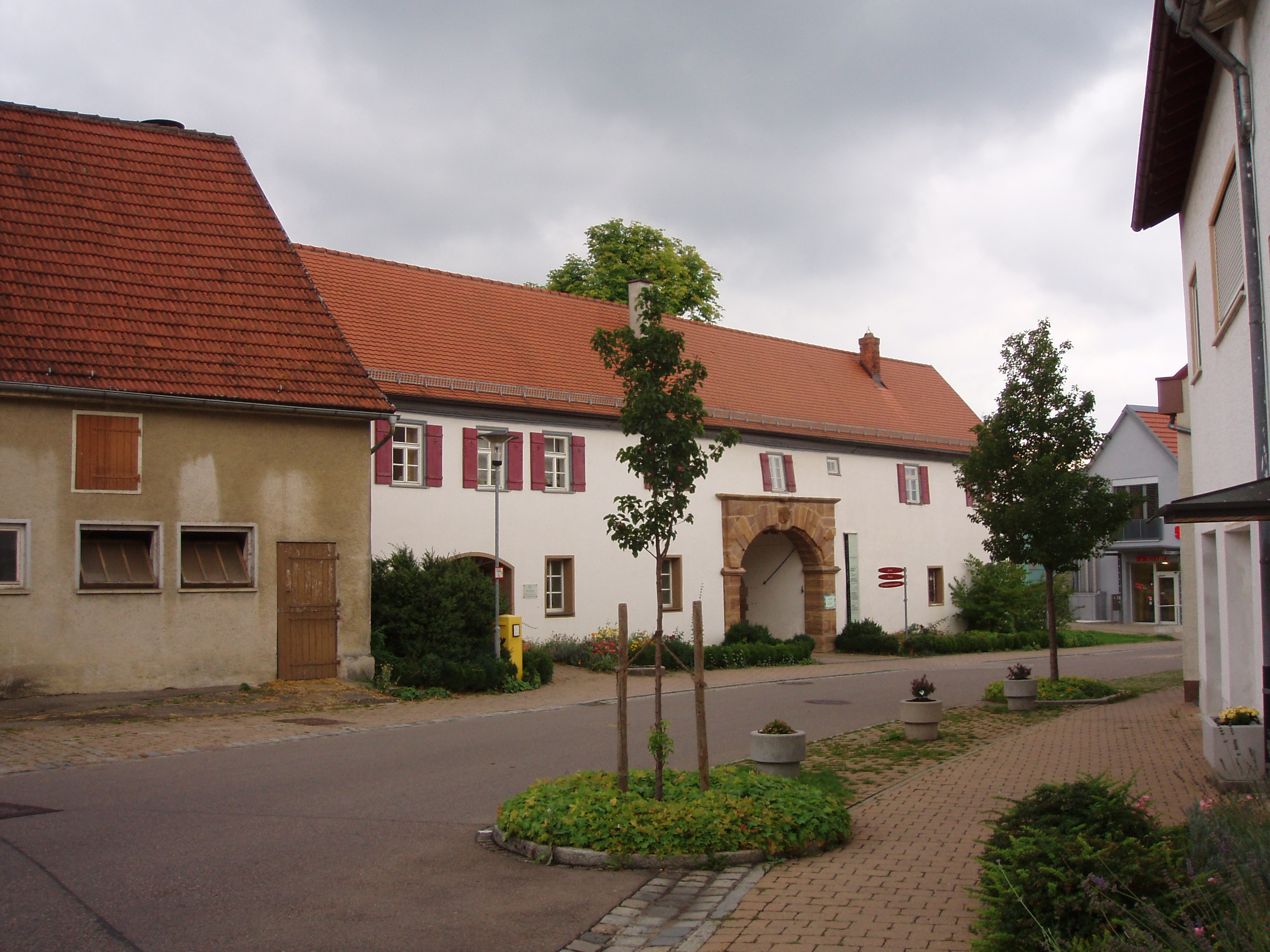 Dürnau, Durchgang zu den Überresten des Schlosses